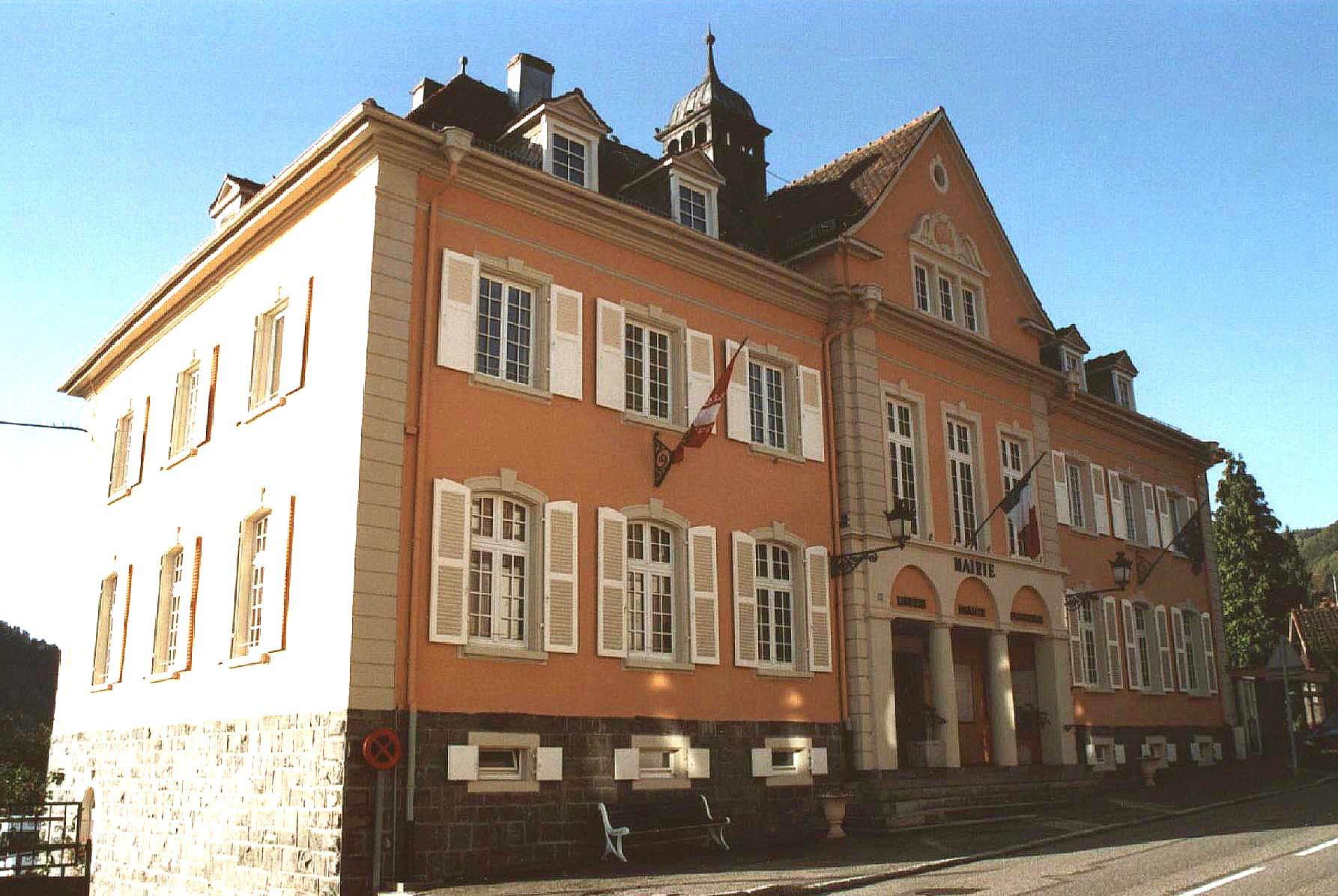 Mairie de Muhlbach-sur-Munster Photo : Samuel Wernain (25 octobre 2006)